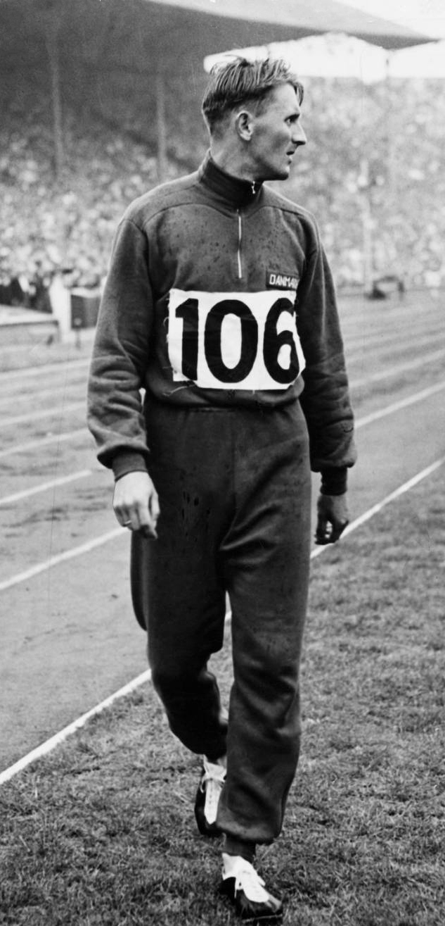 Niels Holst-Sørensen ved EM i Oslo 1946, hvor han vandt en guldmedalje på 400 meter og en sølvmedalje på 800 meter.